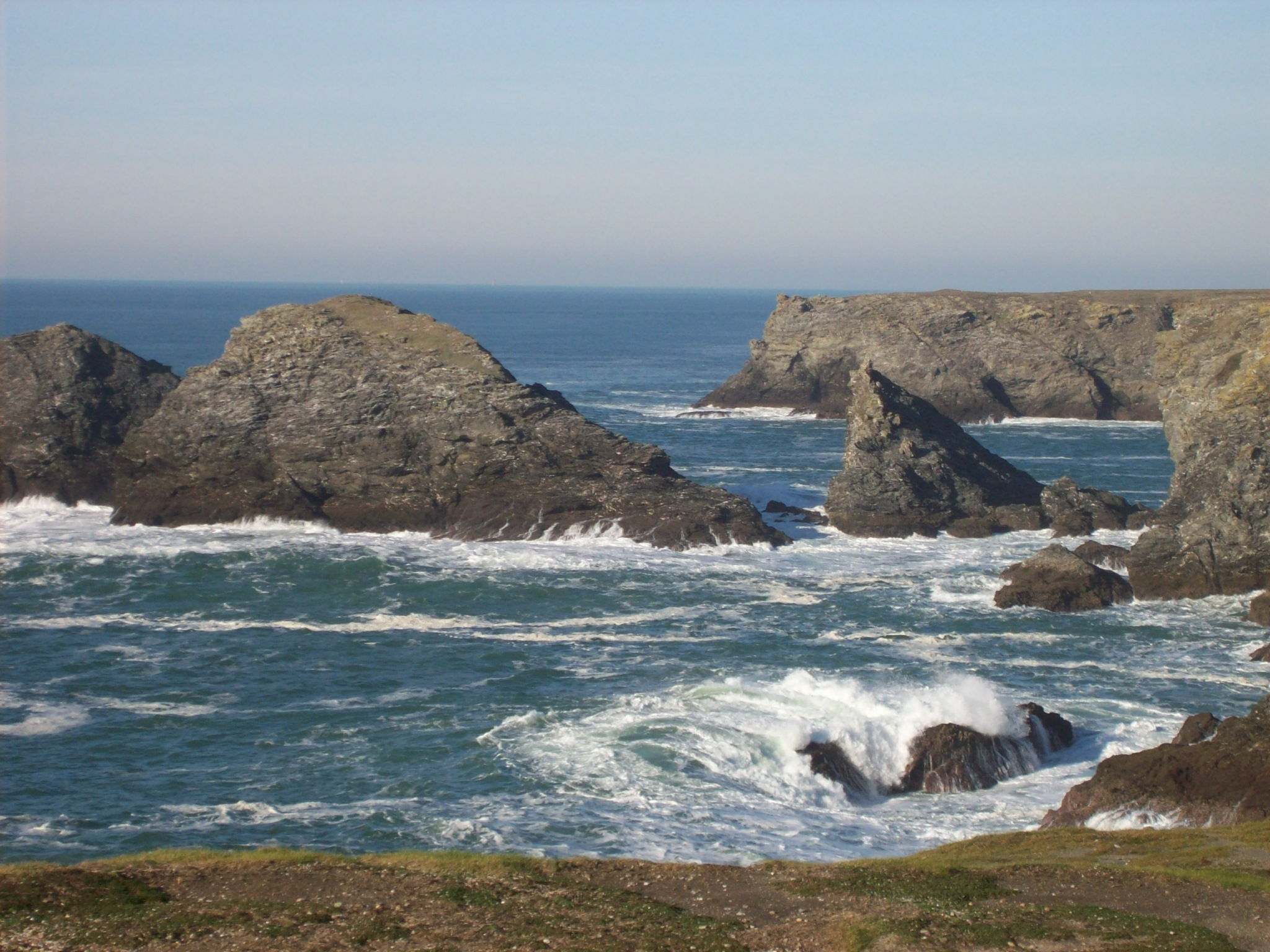 Enez ar Gerveur